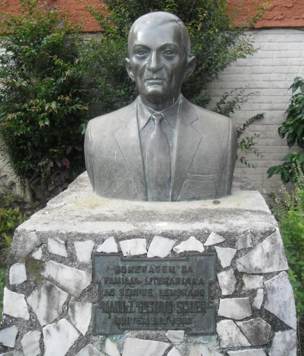 Homenagem a Manoel Gustavo Shier - Clube Literário do Portão